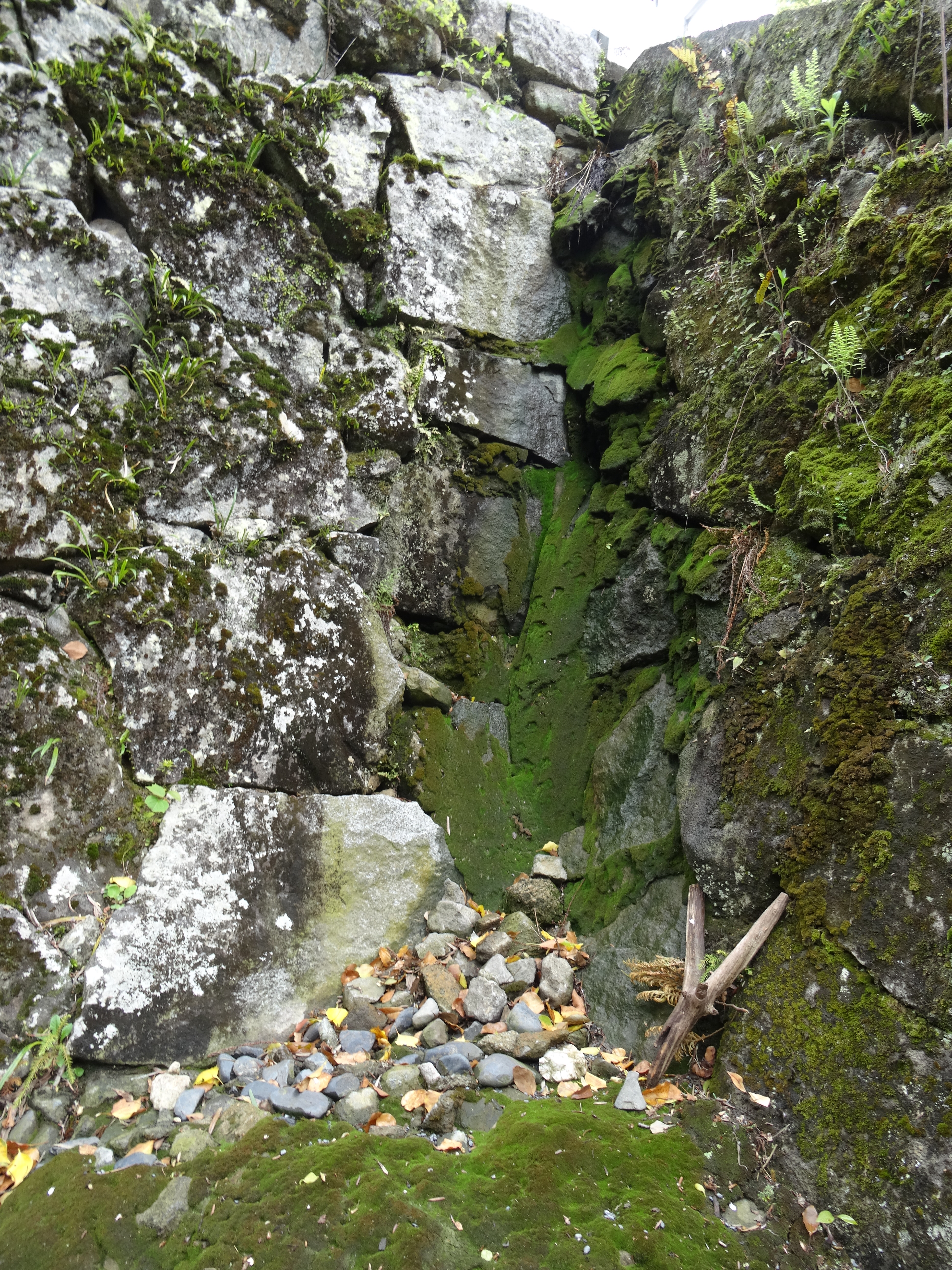 筑波山神社境内内のホンモンジゴケ